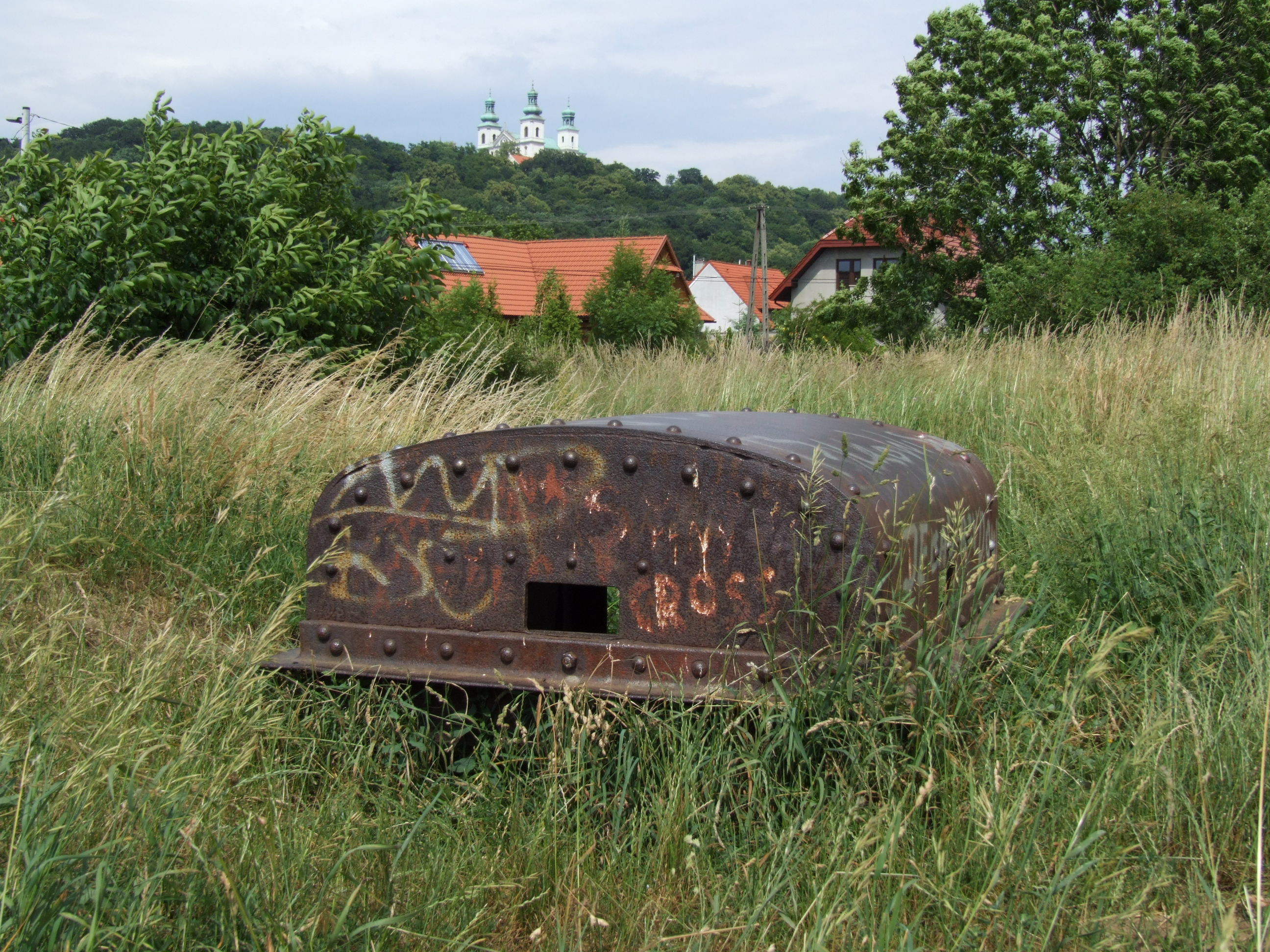 Festung Krakau - Fort Bielany. Pancerna osłona stanowiska obserwacyjnego